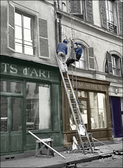 Le plombier sur sa sellette, travail à la corde à nœuds pour le remplacement des tuyaux de descente d'eau pluviales, vers 1920 et jusqu'à 1970.